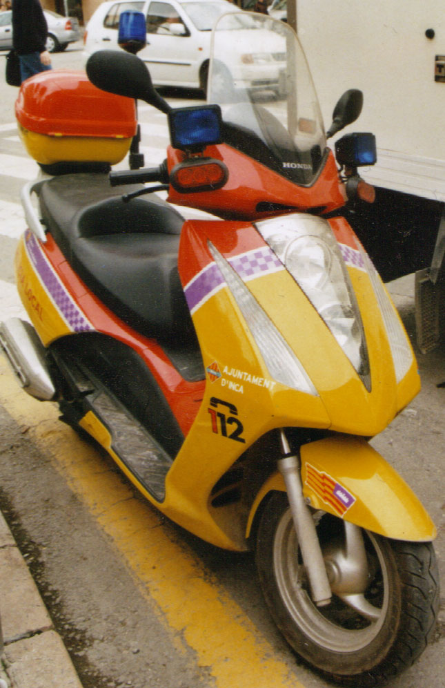 Honda Motorroller der Policia Local Mallorca